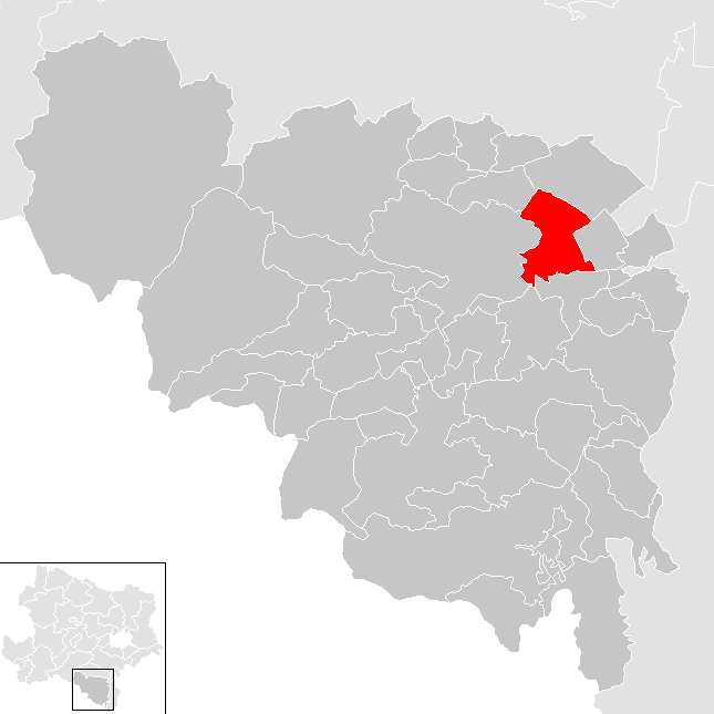 Bezirk Neunkirchen